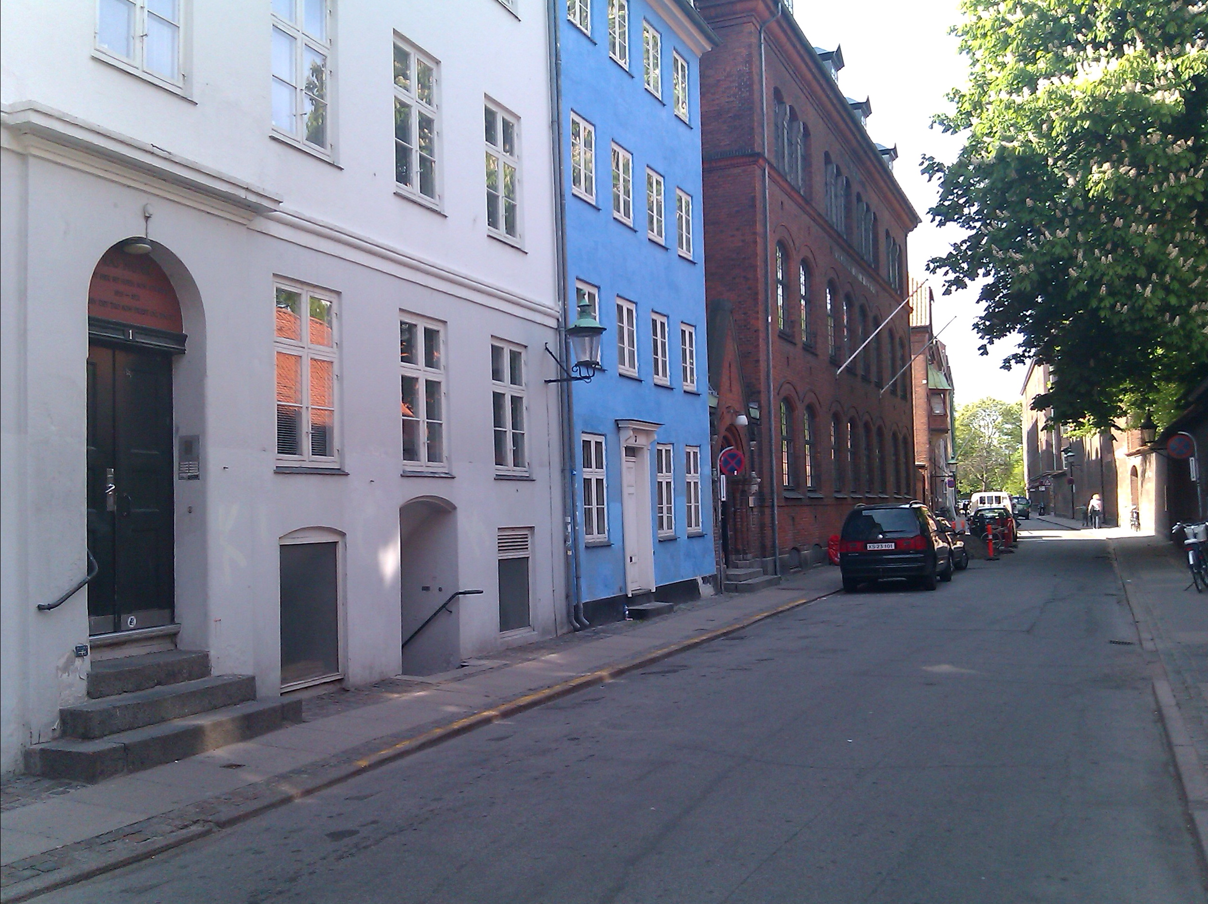 Larslejsstræde, København